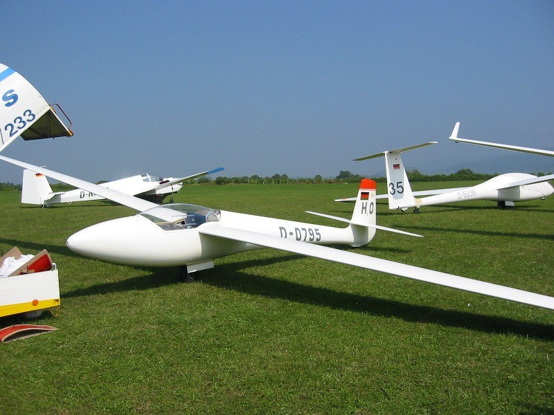 Libelle H301 Eigenes Bild